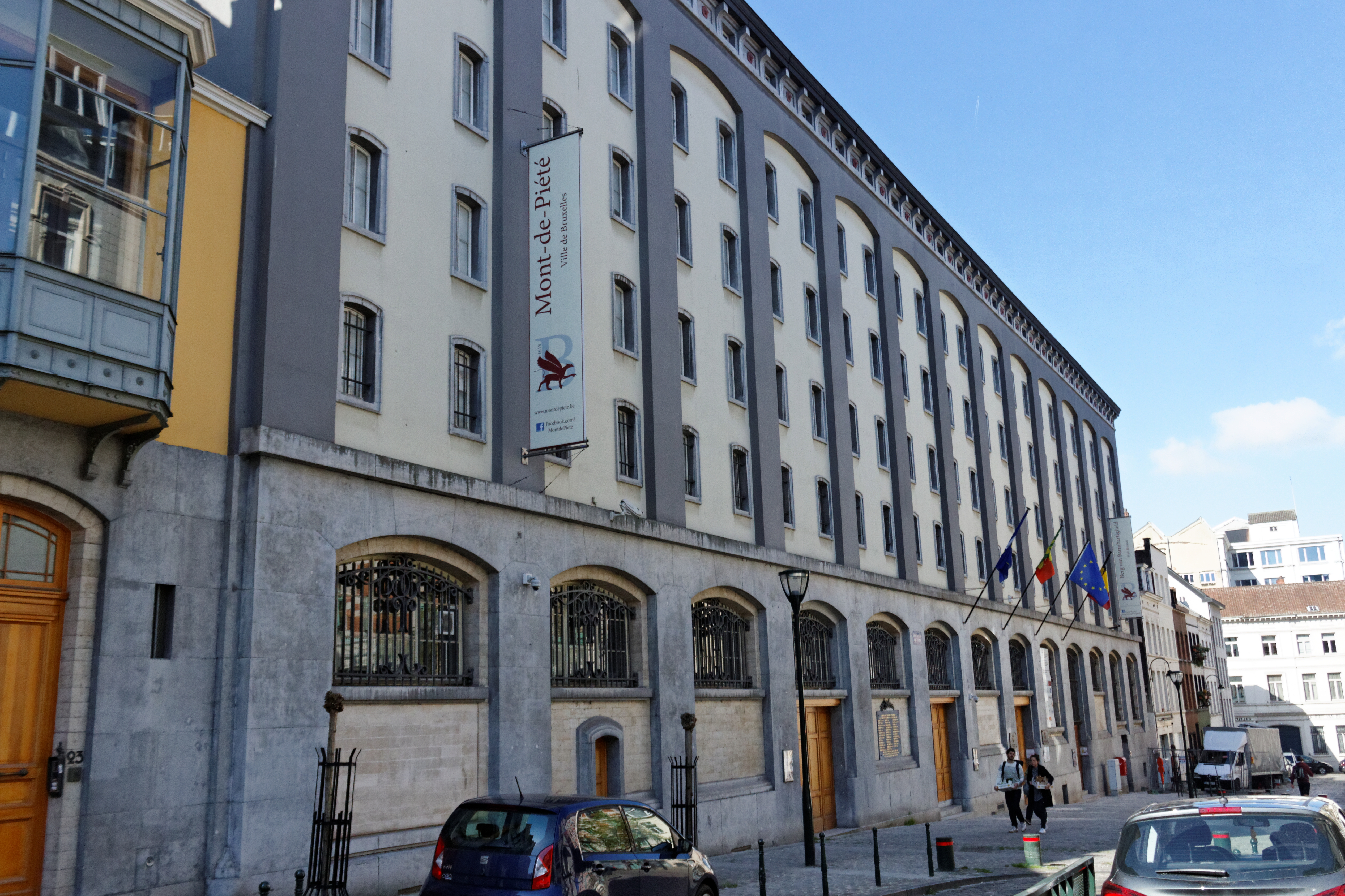 Mont-de-Piété, rue Saint-Ghislain 19-23, Bruxelles